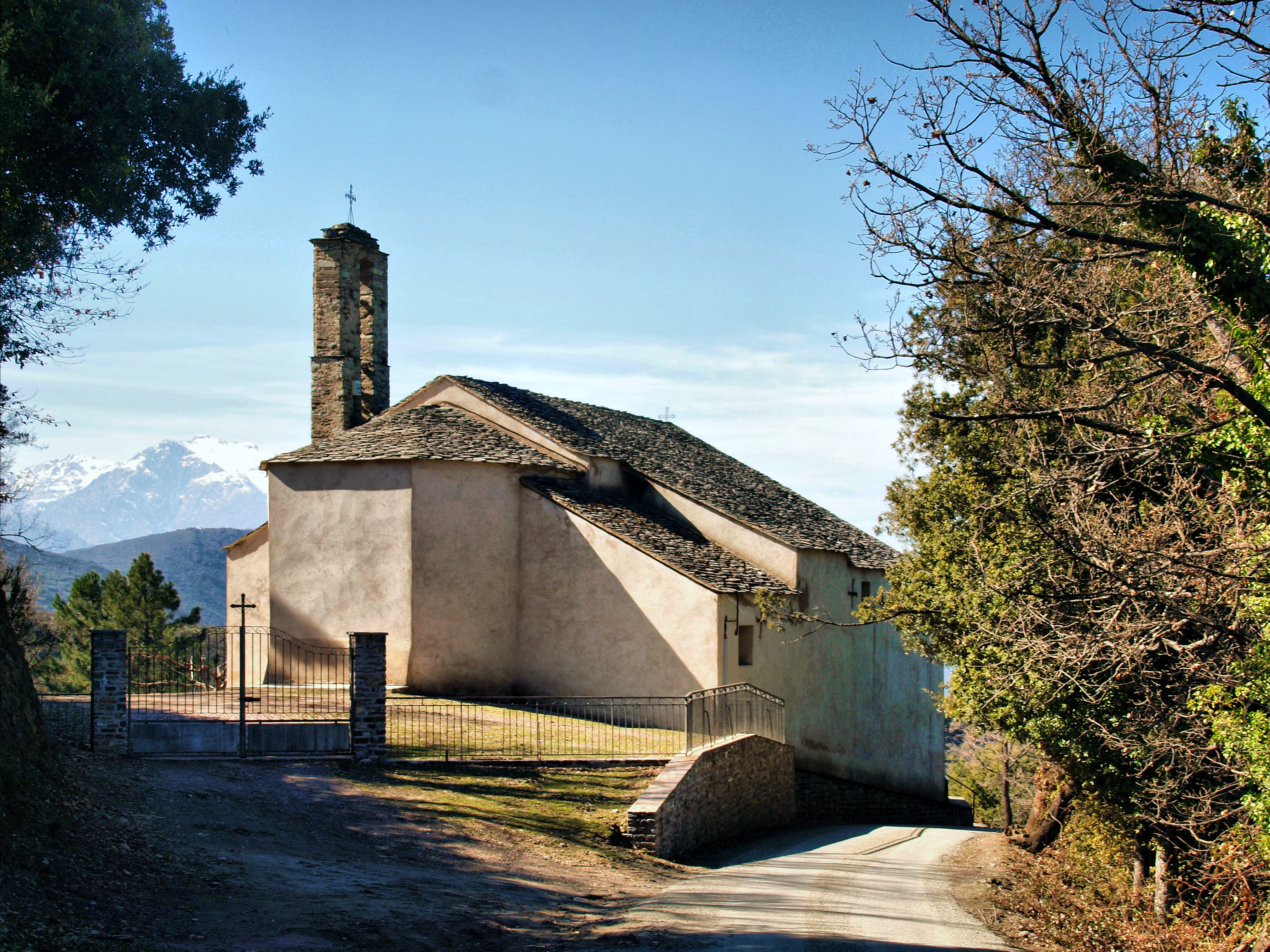 Valle-di-Rostino, Rustinu (Corse) - Église paroissiale Saint-Michel Corsu: E Valle di Rustinu, Rustinu (Corsica) - Chjesa paruchjale San Michele